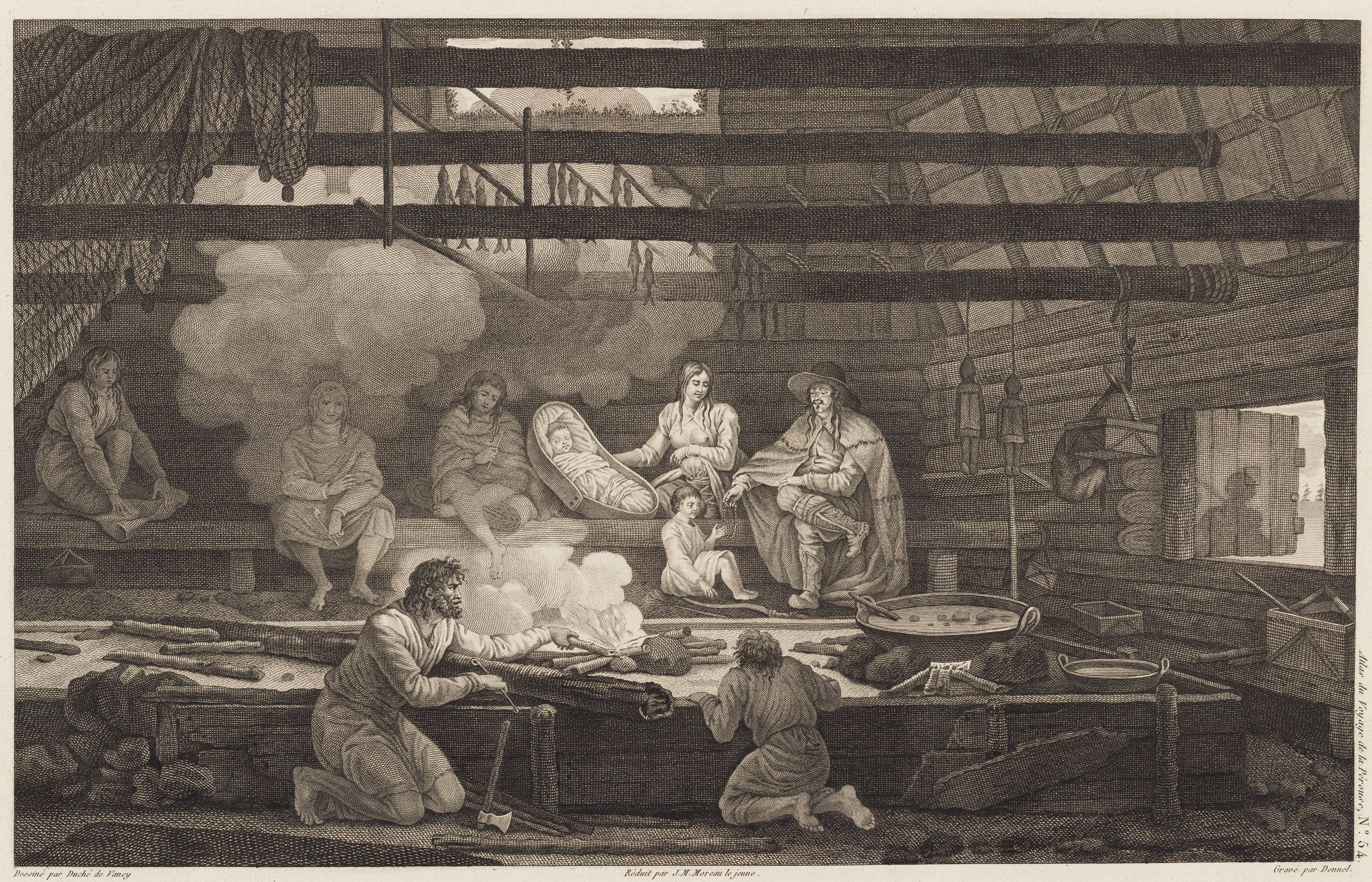 Gravure réalisée d'après un dessin fait par Duché de Vancy en 1787, sur la côte de Tartarie, face à l'île de Sakhaline, océan pacifique. Escale dans la baie dite de Castrie, lors de l'expédition La Pérouse.